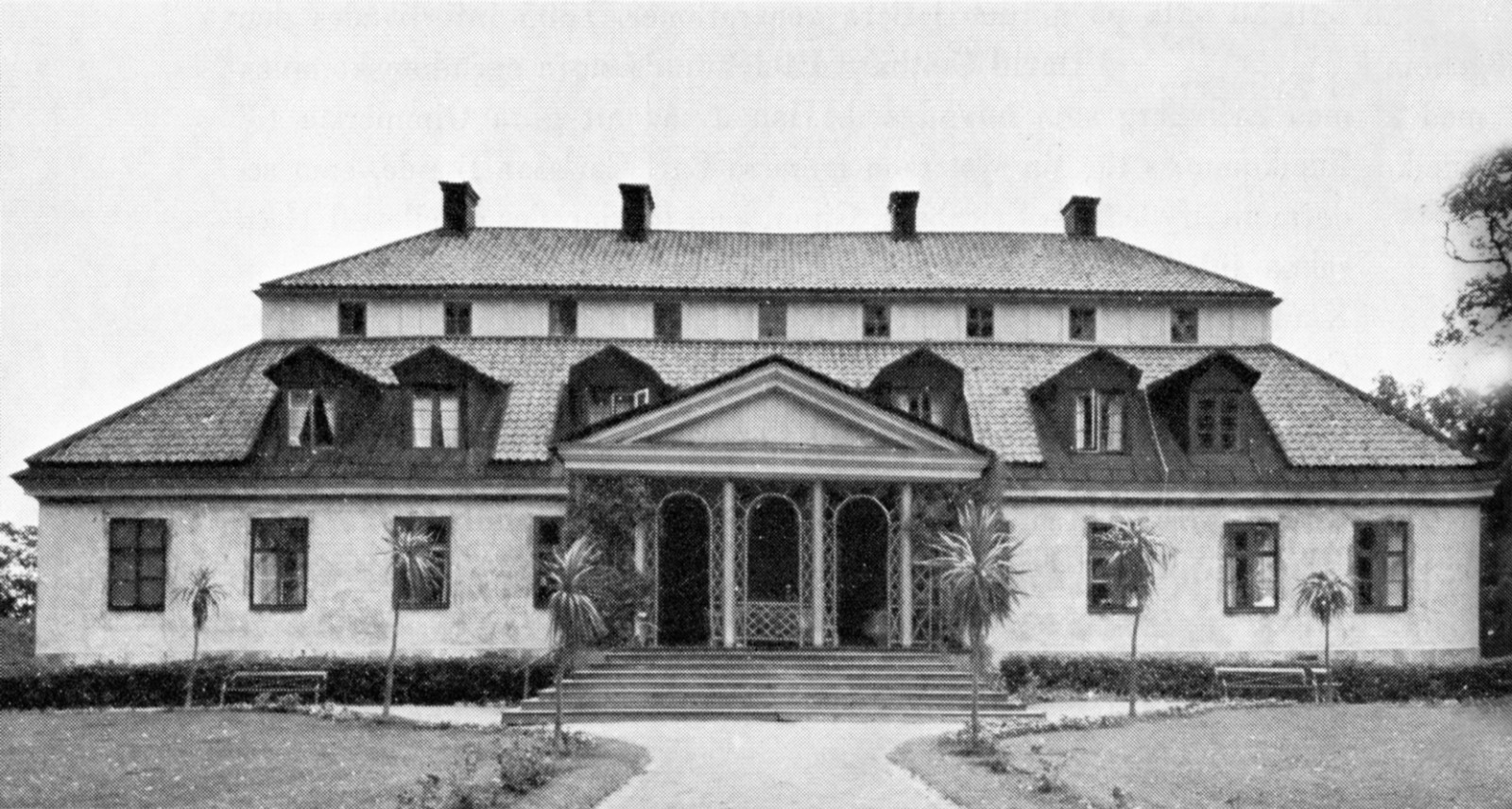 Gimmersta gård